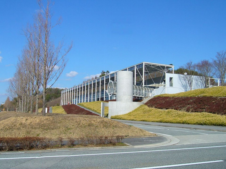 播磨科学公園都市 光都プラザ（上郡町光都2丁目）